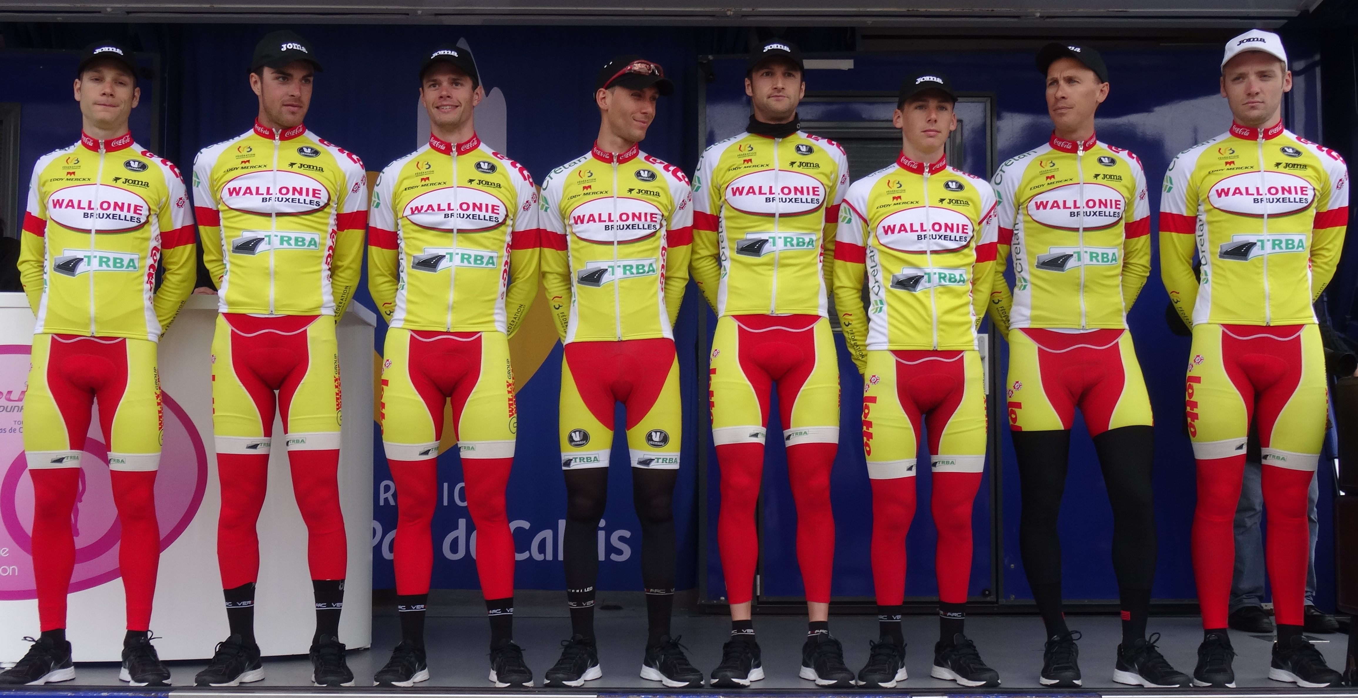 Reportage photographique réalisé le jeudi 8 mai 2014 au départ de la deuxième étape de l'édition 2014 des Quatre jours de Dunkerque à Hazebrouck, Nord, Nord-Pas-de-Calais, France. Depicted people: Antoine Demoitié, Boris Dron, Loïc Pestiaux, Quentin Bertholet, Sébastien Delfosse, Jonathan Dufrasne, Frédéric Amorison and Robin Stenuit Depicted team: Wallonie-Bruxelles